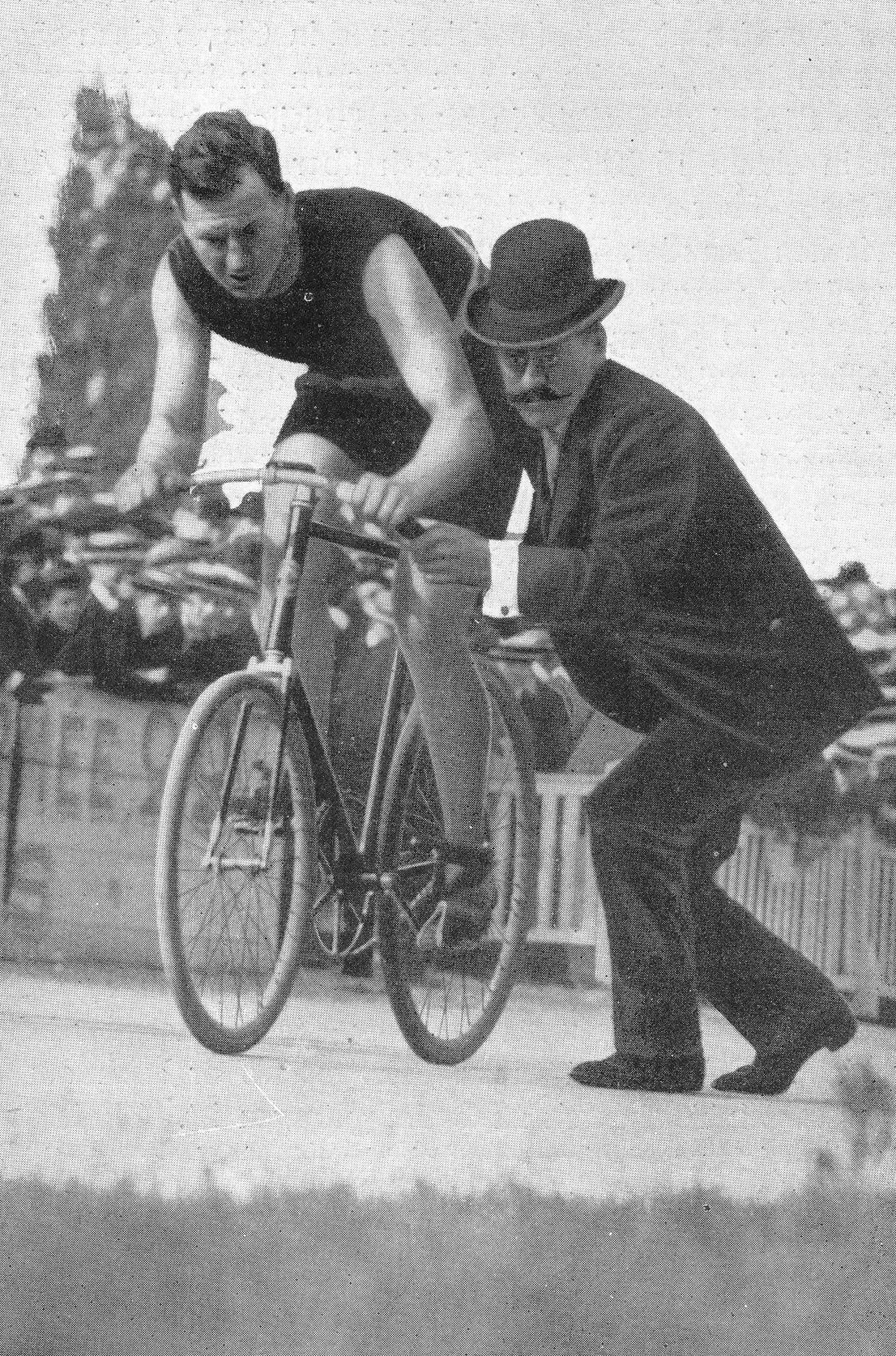 George Leander, US-amerikanischer Radrennfahrer